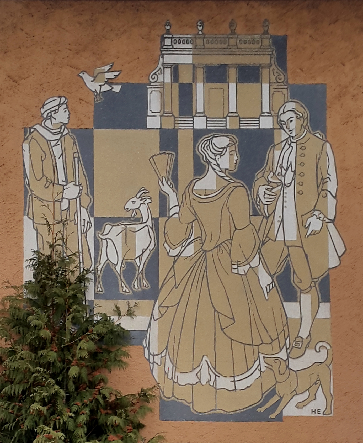 Hans Erni (1909–2015), Bethli und Ruedi, die Gloriette der Campagne Oberried in Belp, nach dem 1901 erschienenen Roman Jä gäll, so geit's!, von Rudolf von Tavel.